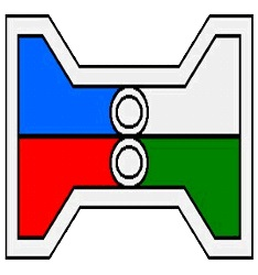 Glifo de Tasquillo, Hidalgo